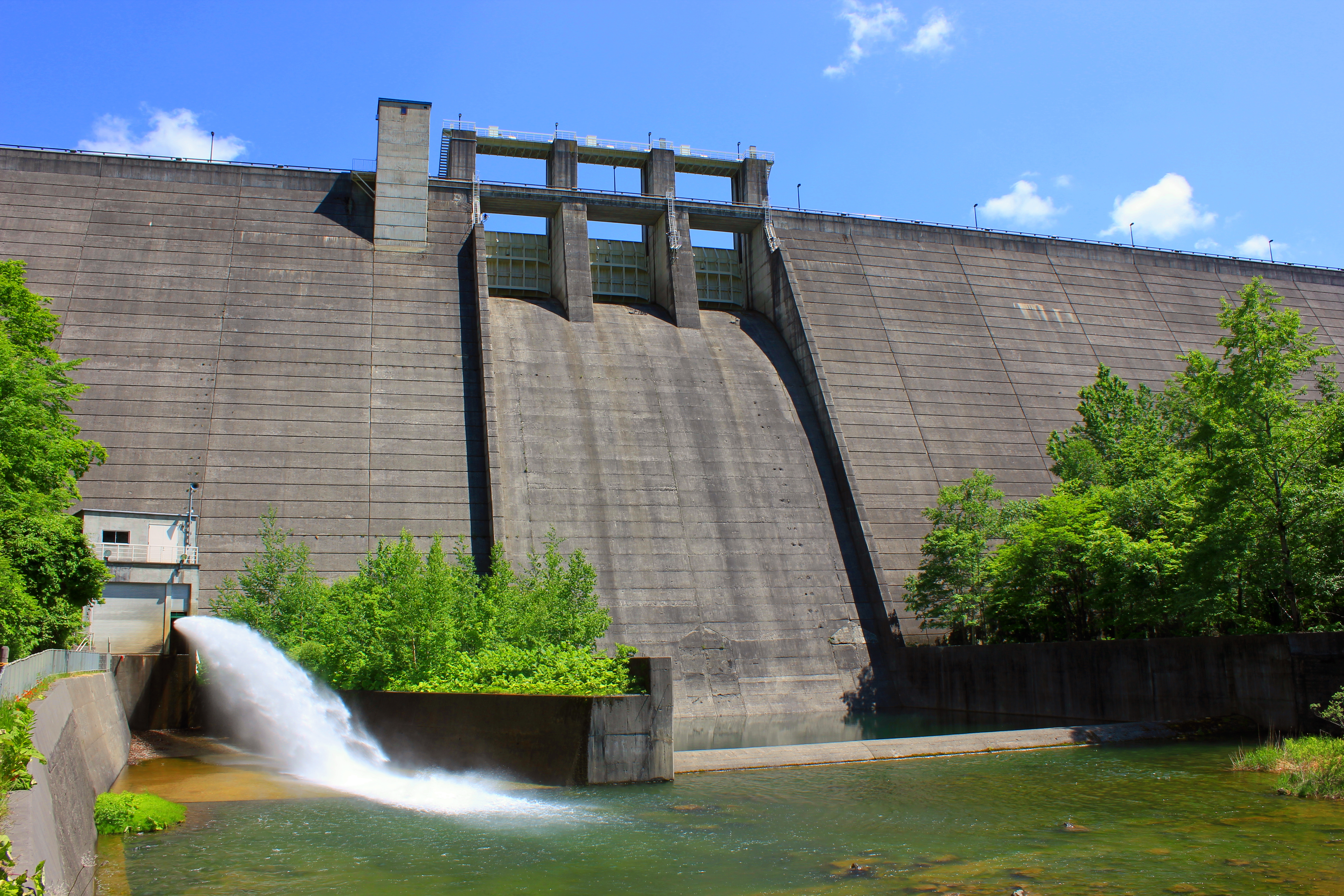 金山ダム（北海道・空知川。国土交通省北海道開発局管理）